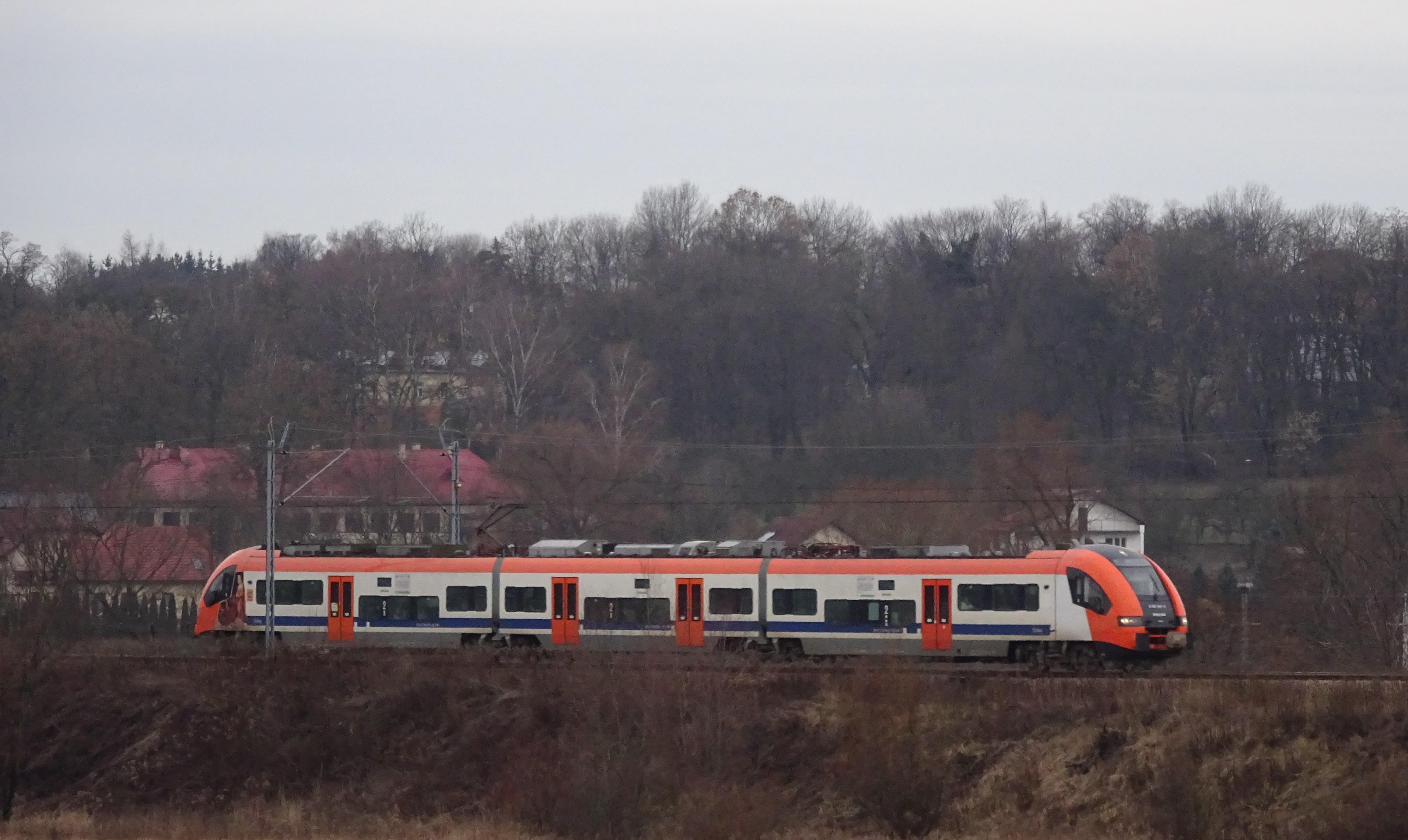 Pesa Acatus Plus należąca do Kolei Małopolskich na linii nr 8 w drodze do Sędziszowa na linii SKA S2 w Zesławicach, Kraków.